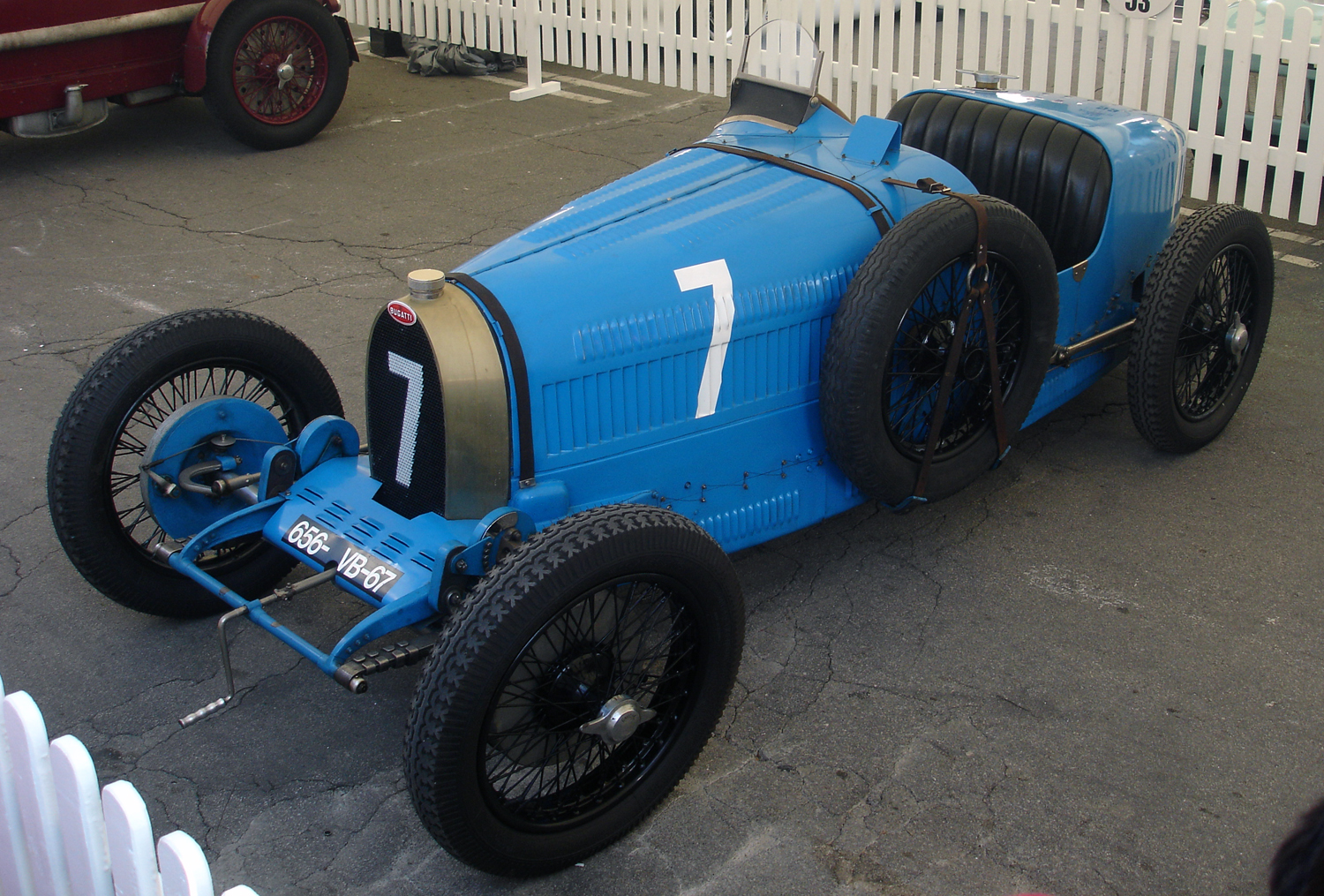 Bugatti Type 37, exposat al festival Martini Legends (commemoració del 75 aniversari del Circuit de Montjuïc)